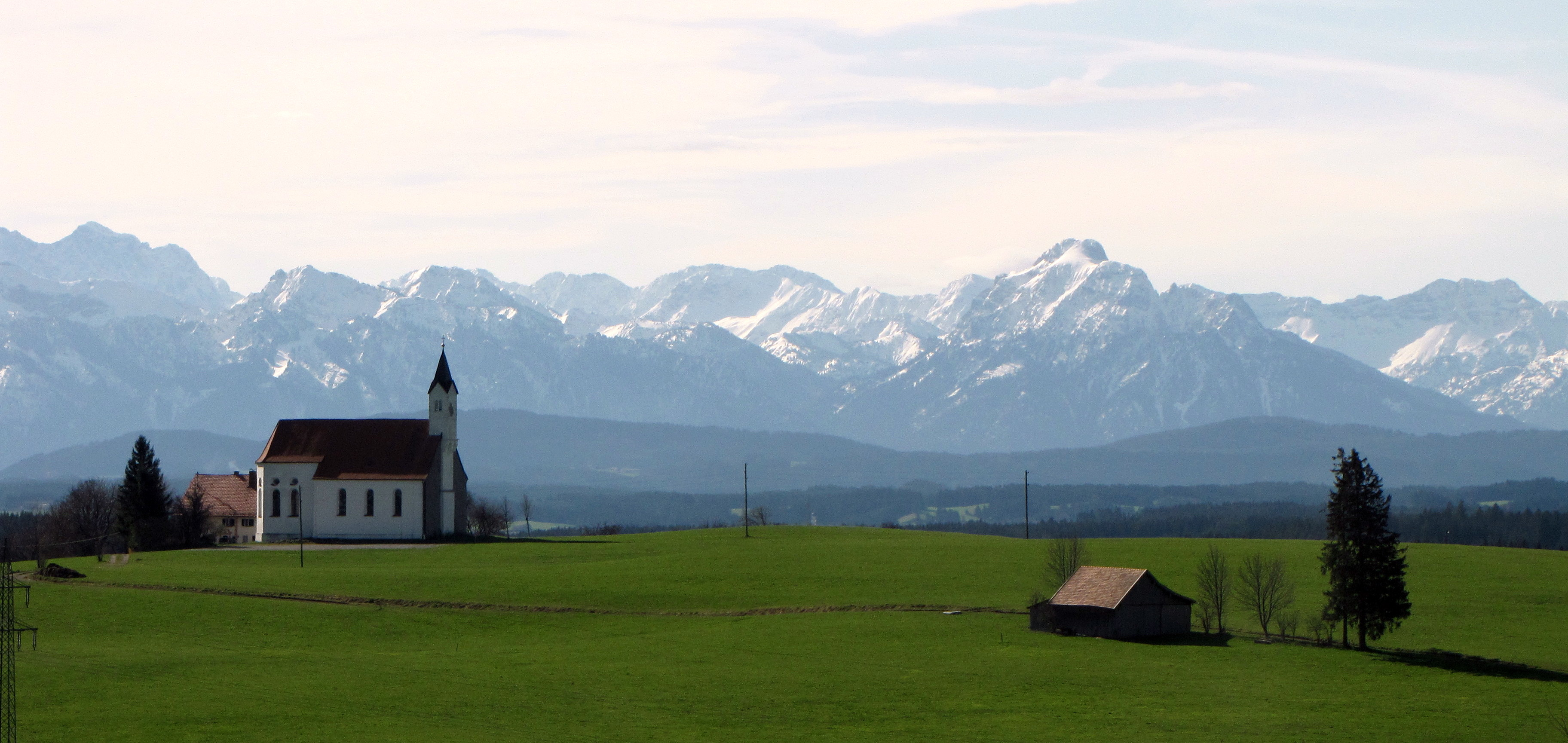 Blick auf die Wallfahrtskirche St. Alban über Görwangs und auf die Kulisse der Allgäuer Alpen